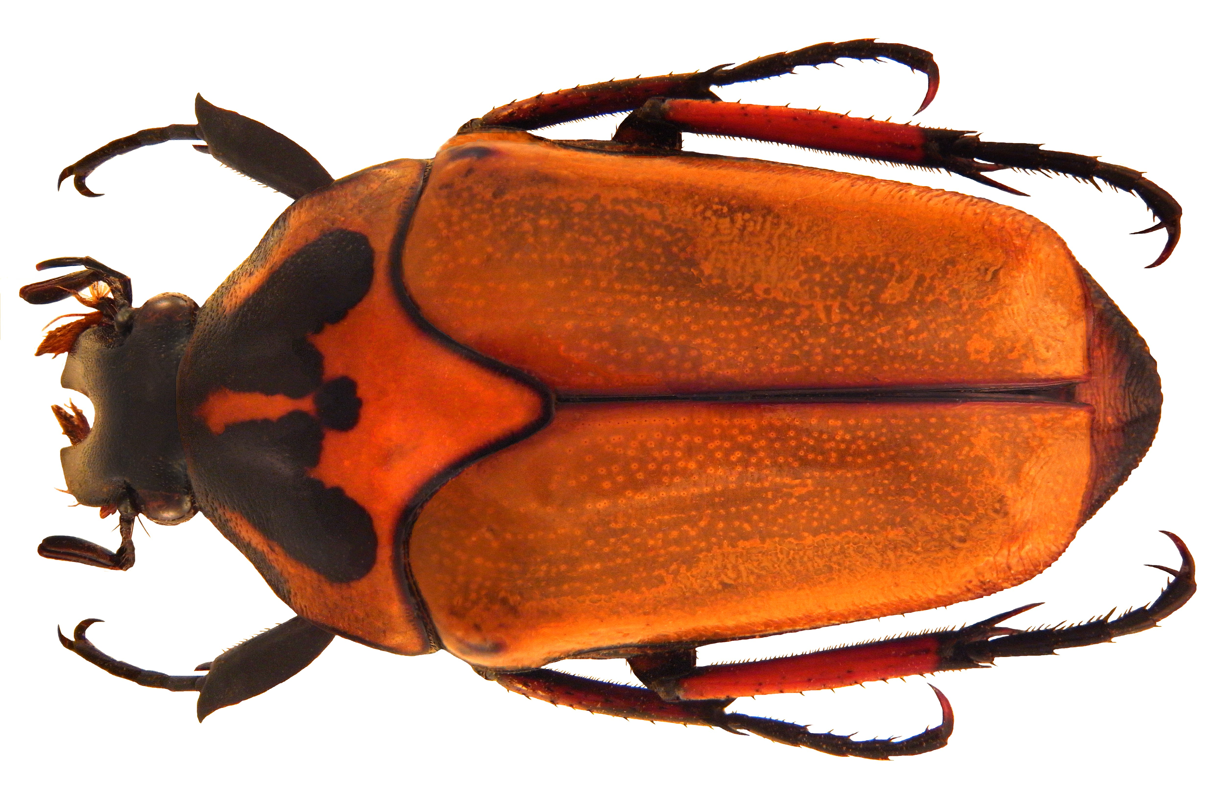 Familie: Scarabaeidae Groesse: 35 mm Verbreitung: Papua Neuguinea Fundort: Papua Neuguinea, Asau, 2006 det. U.Schmidt, 2010 Photo: U.Schmidt, 2010